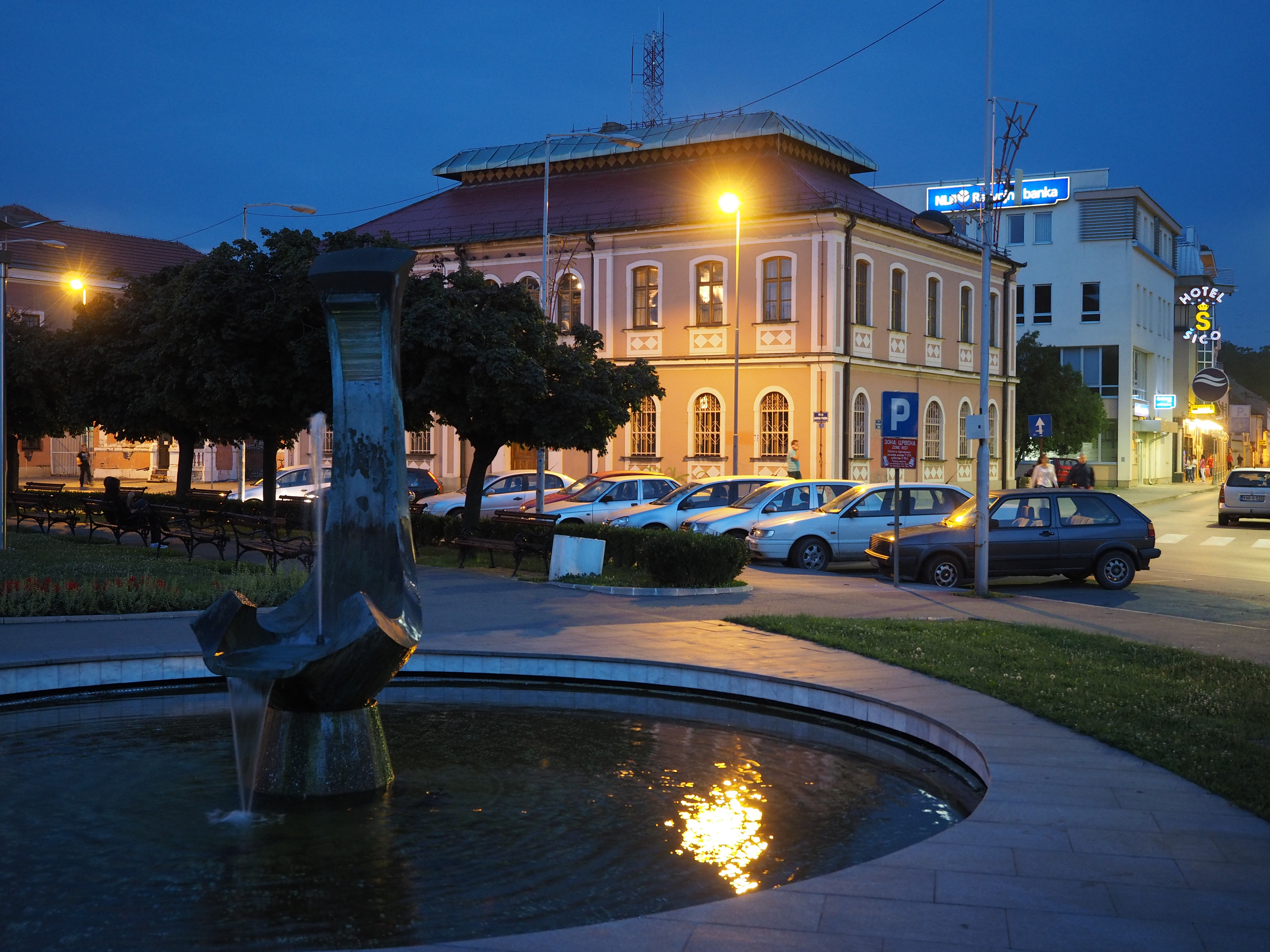 Музеј Семберије, Бијељина ID добра: NKD213